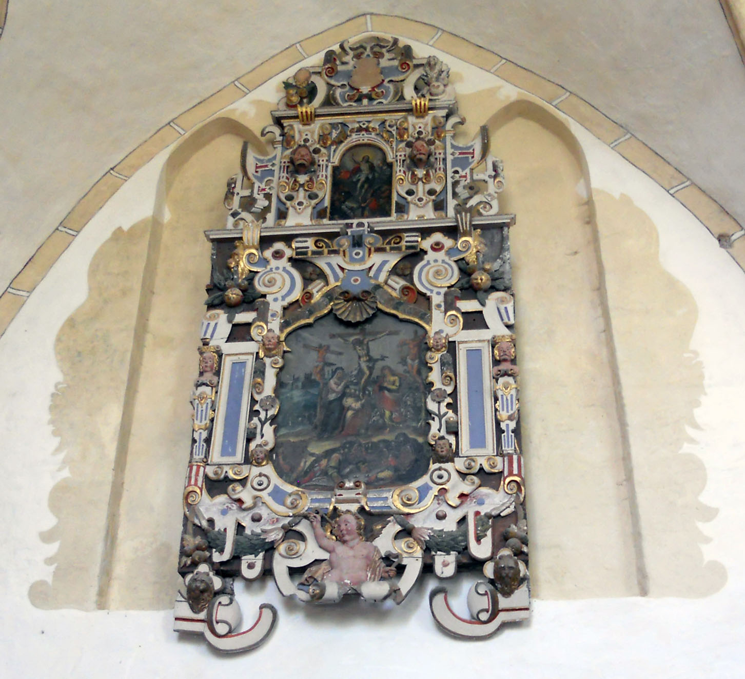 Epitaphie oder Altaraufsatz, St.-Katharinenkirche, Trent, Rügen